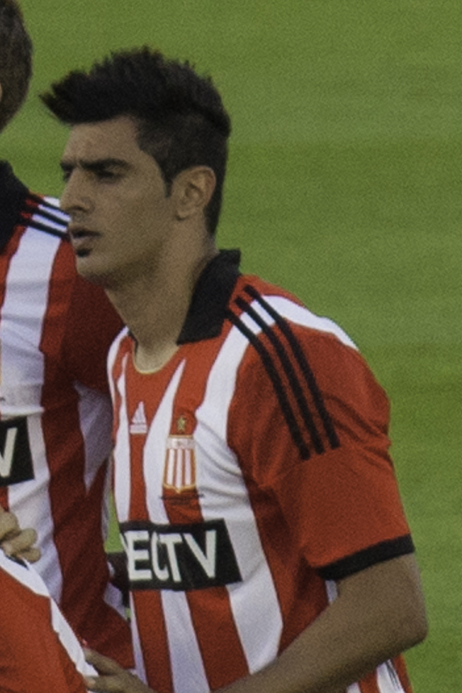 Estudiantes de La Plata starting XI against Penarol in Copa Sudamericana 2014.